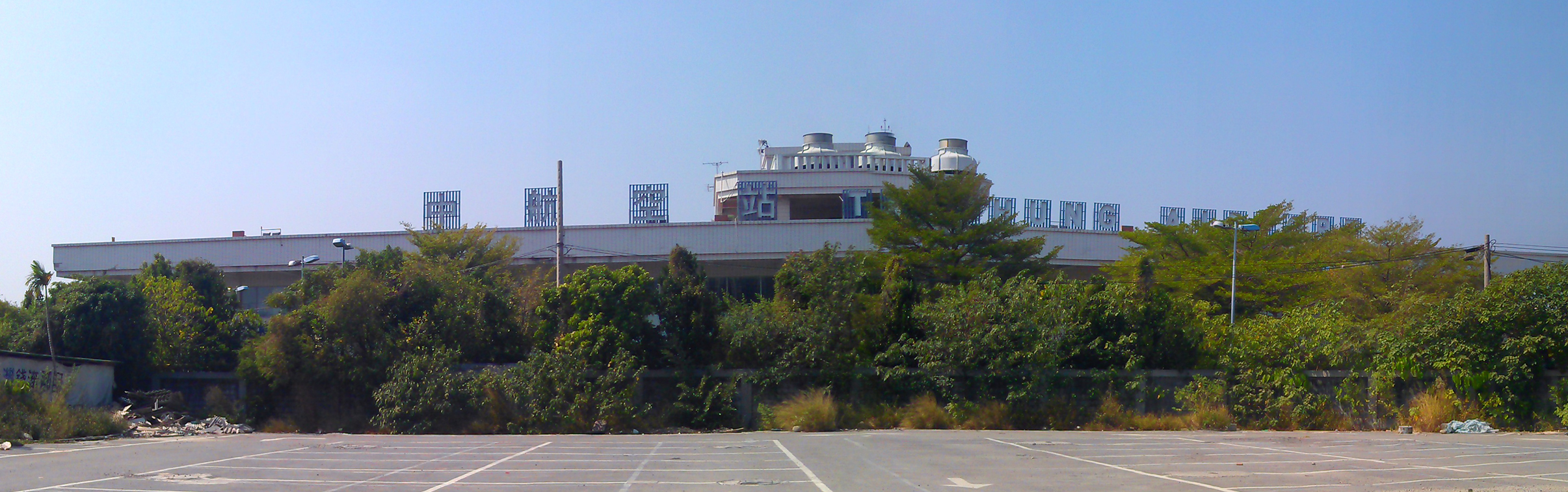 中文（台灣）: 水湳台中航空站址